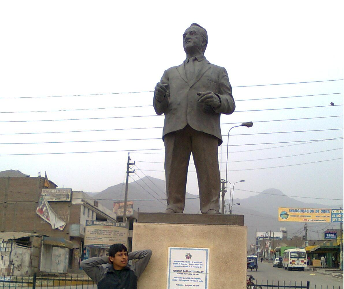 Primer monumento al ex-alcalde Alfonso Barrantes erigido en el municipio de Ate en Huaycán. Alfonso Barrantes Lingán